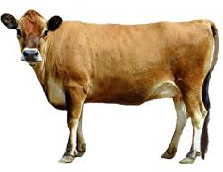 Džerzej krava